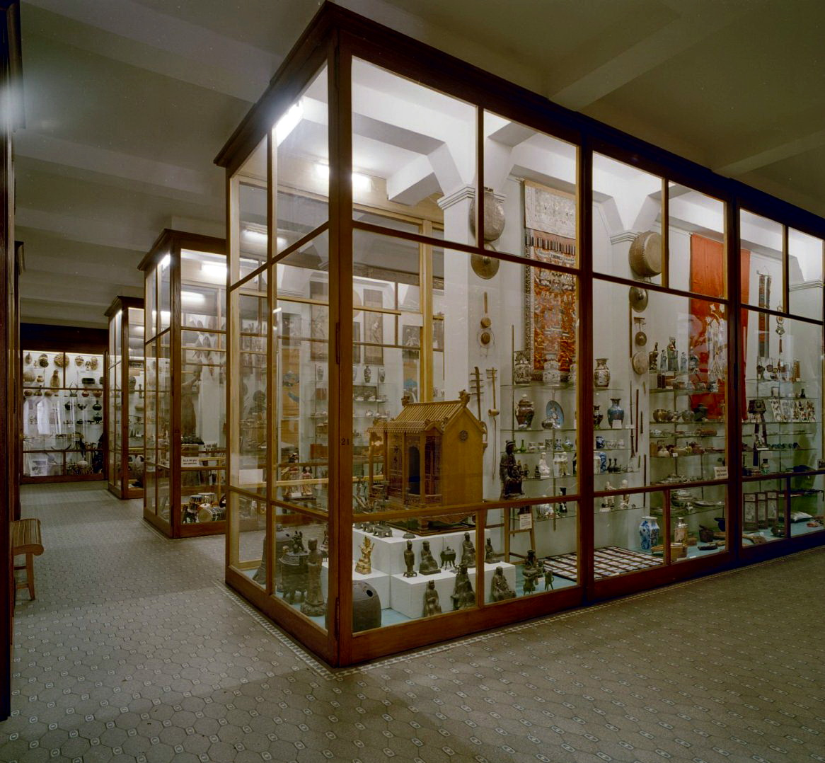 Missiehuis Sint Michael: Interieur Missiemuseum, zaal met glazen vitrinekasten met diversen kunstvoorwerpen